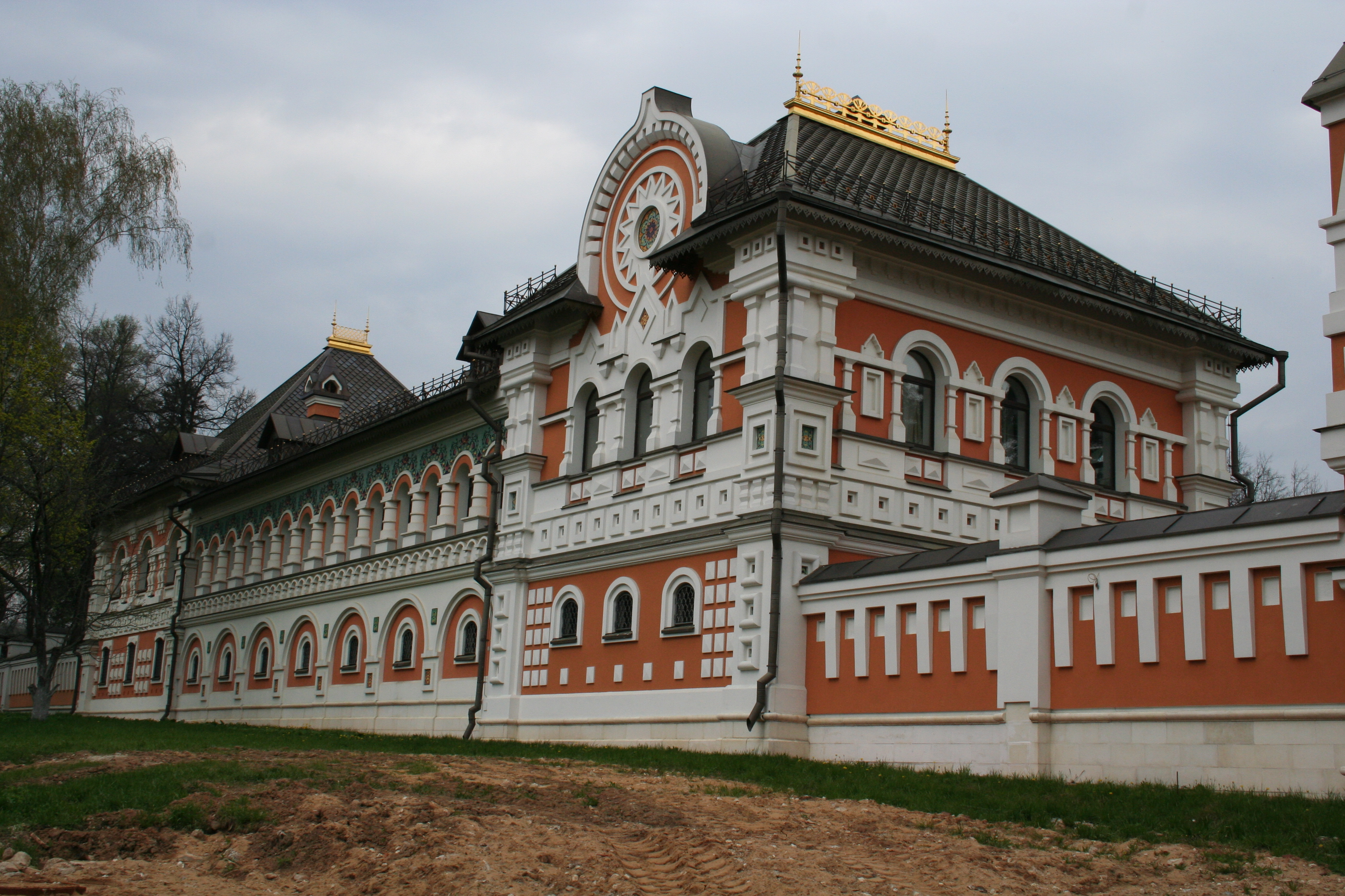 Комплекс патриаршей резиденции в Переделкине. Бывшая усадьба "Лукино" М. Л. Колычева-Боде